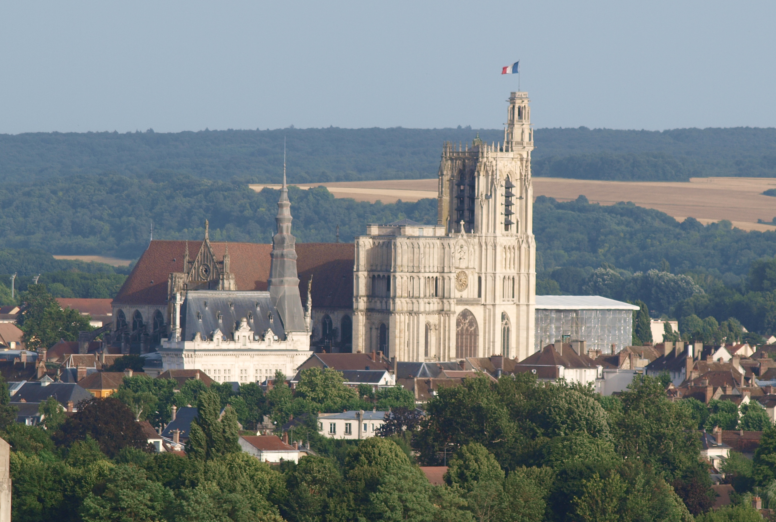 Sens (Yonne, France), vue depuis l'église de Saint-Martin-du-Tertre : la mairie & la cathédrale